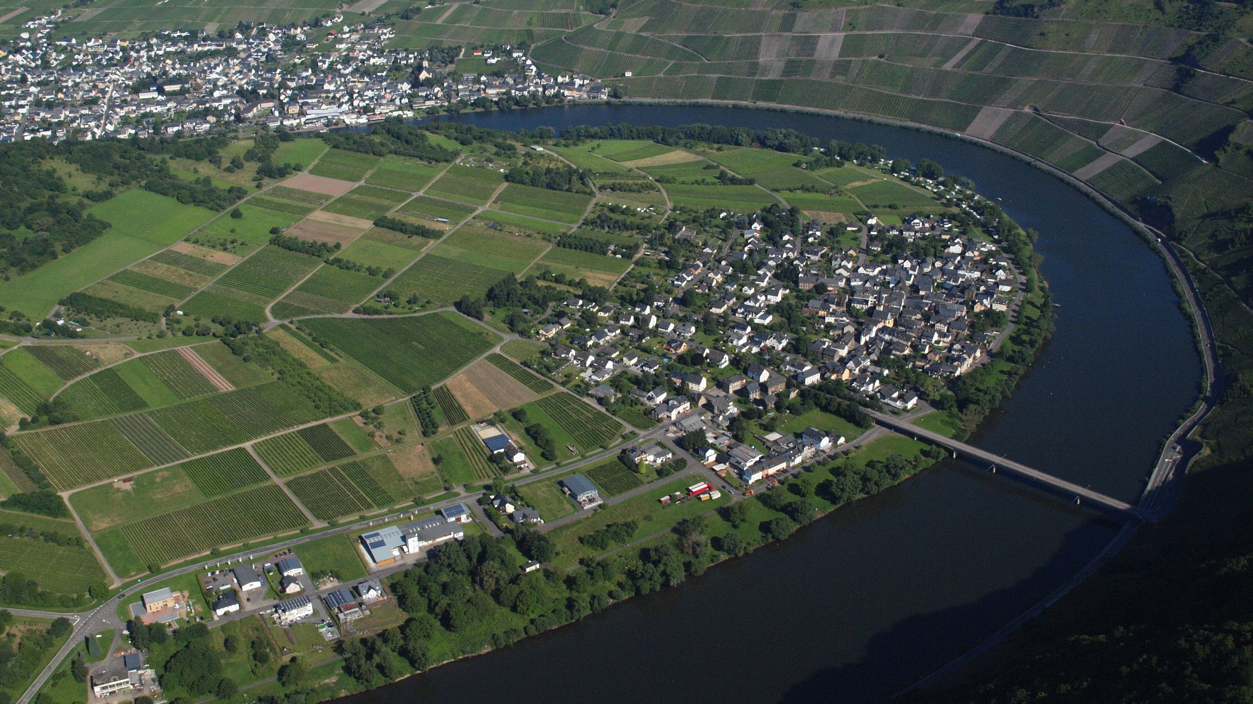 Wolf aus südöstlicher Richtung